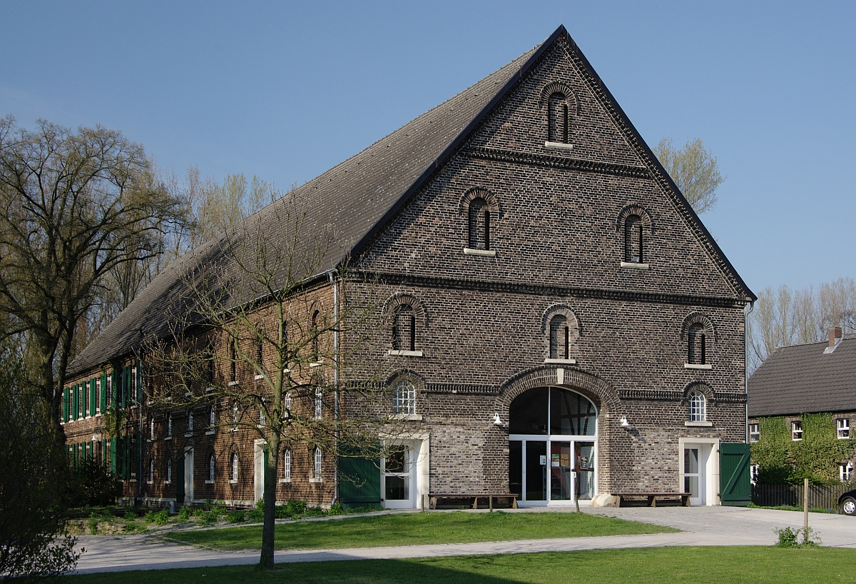 Schulze-Heil, Baudenkmal in Bergkamen, Nordrhein-Westfalen. Hofanlagen 1864 errichtet, Grabanlagen 1665 - 1730